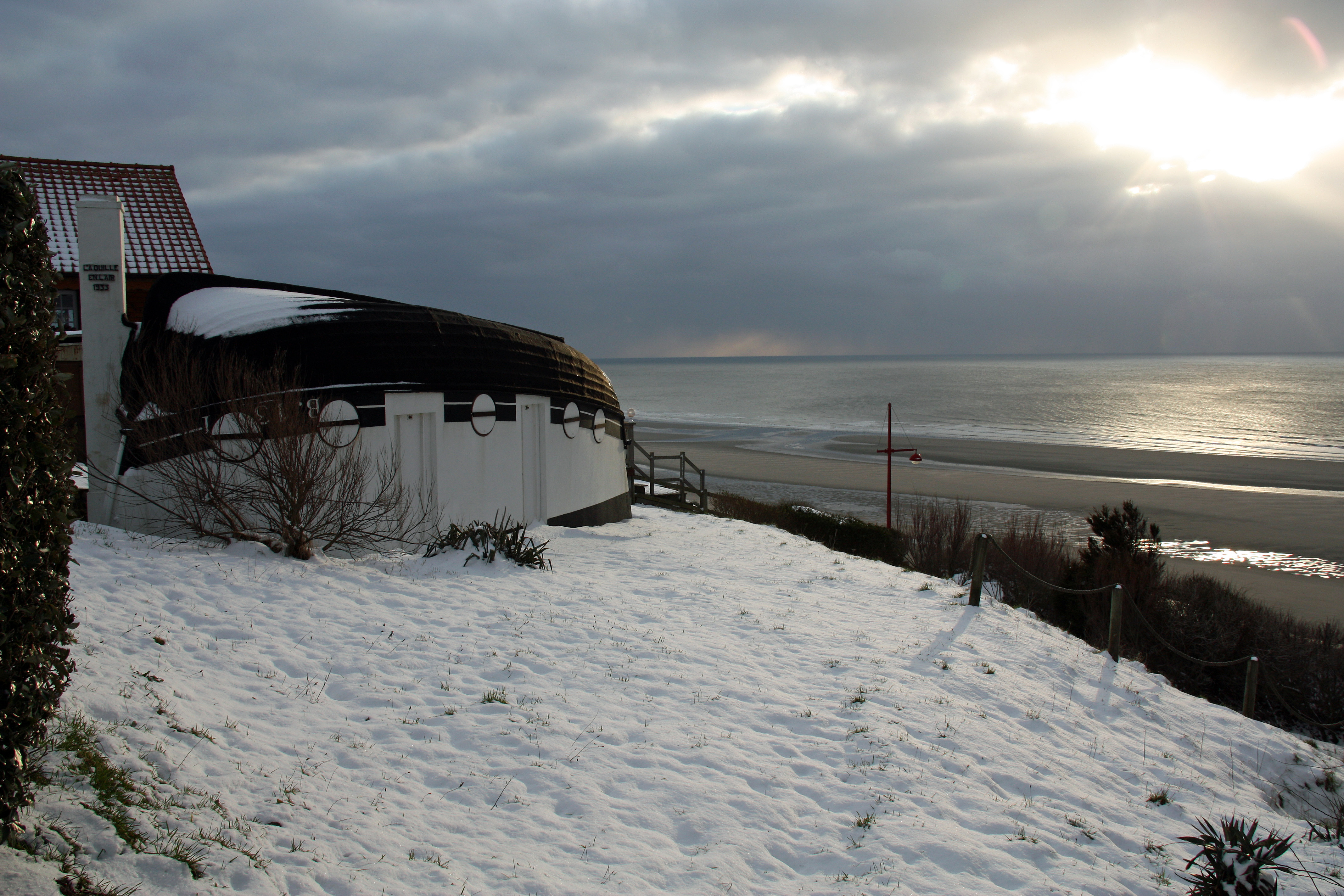 Parc naturel régional des caps et maris d'opale - EQUIHEN-PLAGE ancien village de pêcheurs. Les barques retournées a usage d'habitations pour les plus pauvres étaient répandues dans le village à la fin du 19 ème siècle et au début du 20 ème siécle.Celle-ci est datée de 1933. Il y a quelques années la commune a repris la construction modernisée de ces habitations et les propose aux touristes dans son camping municipal.